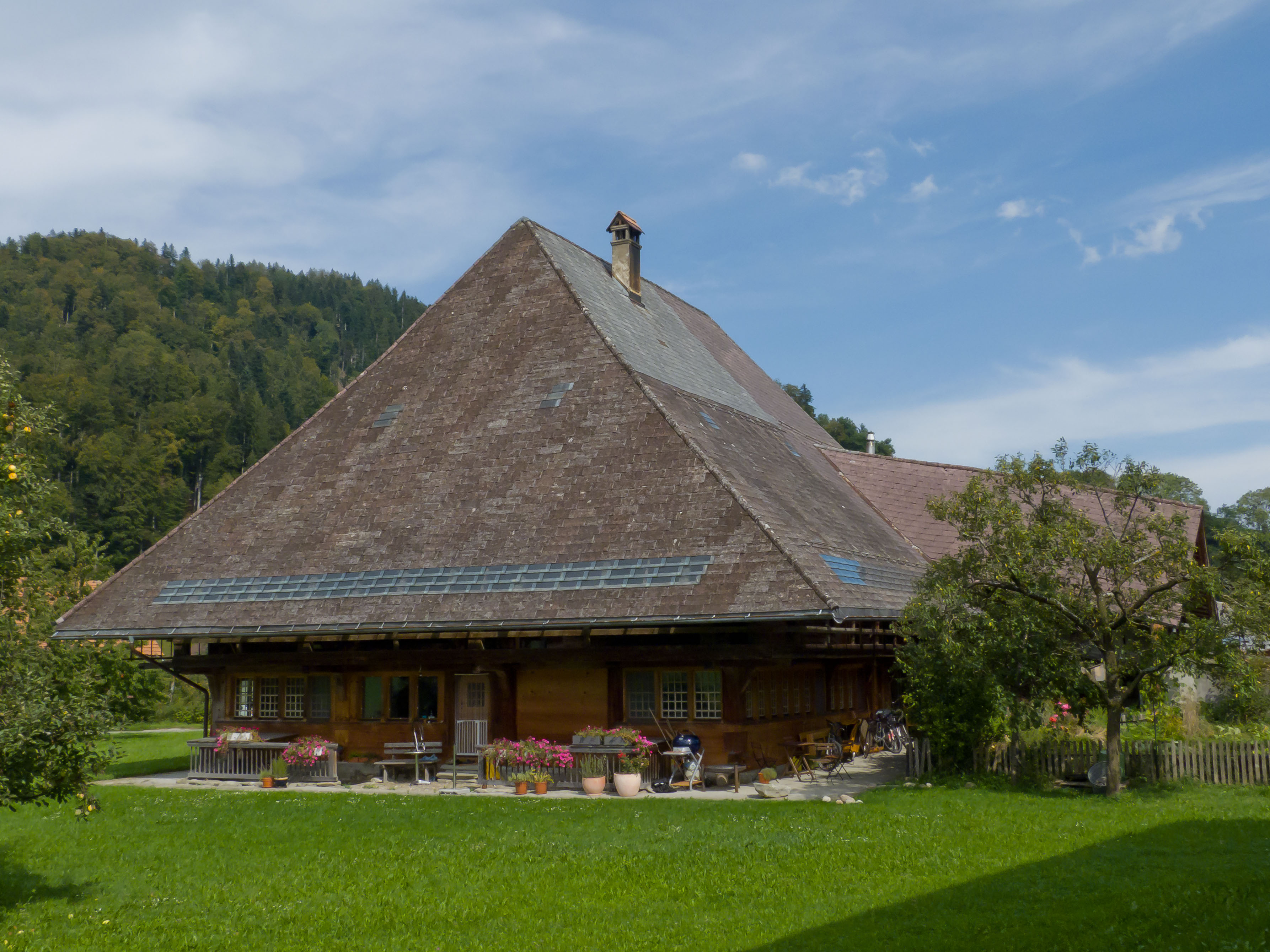 Hochstudhaus mit allseitig heruntergezogenem Dach, ehem. Bauernhaus ganz aus Holz